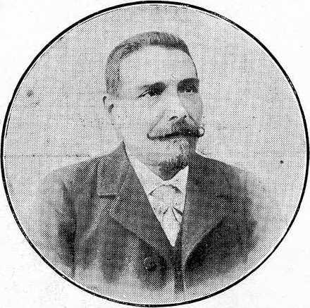 Andrés Landín, fotografía en Vida Gallega 1910